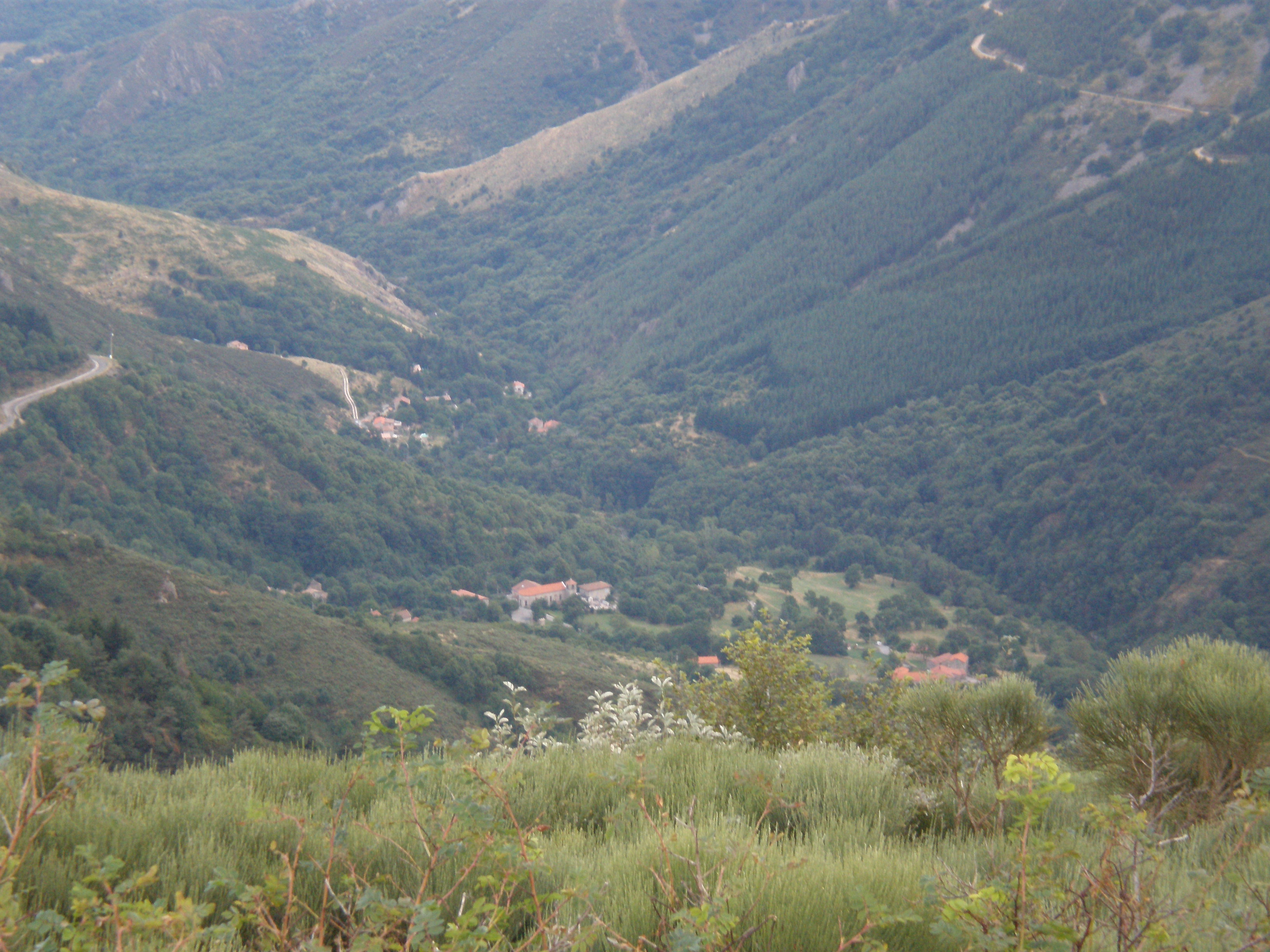 Le village d'Astet en ardèche